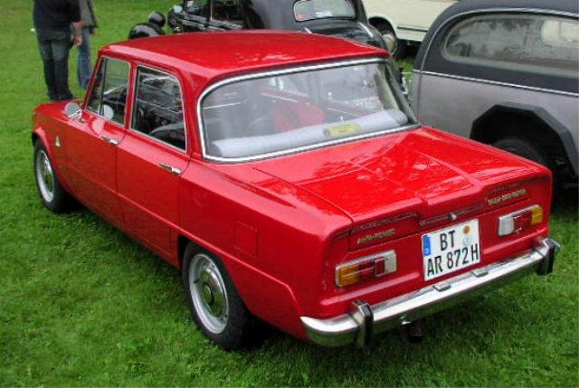 Alfa-Romeo Giulia Nuova 1300 Sedan